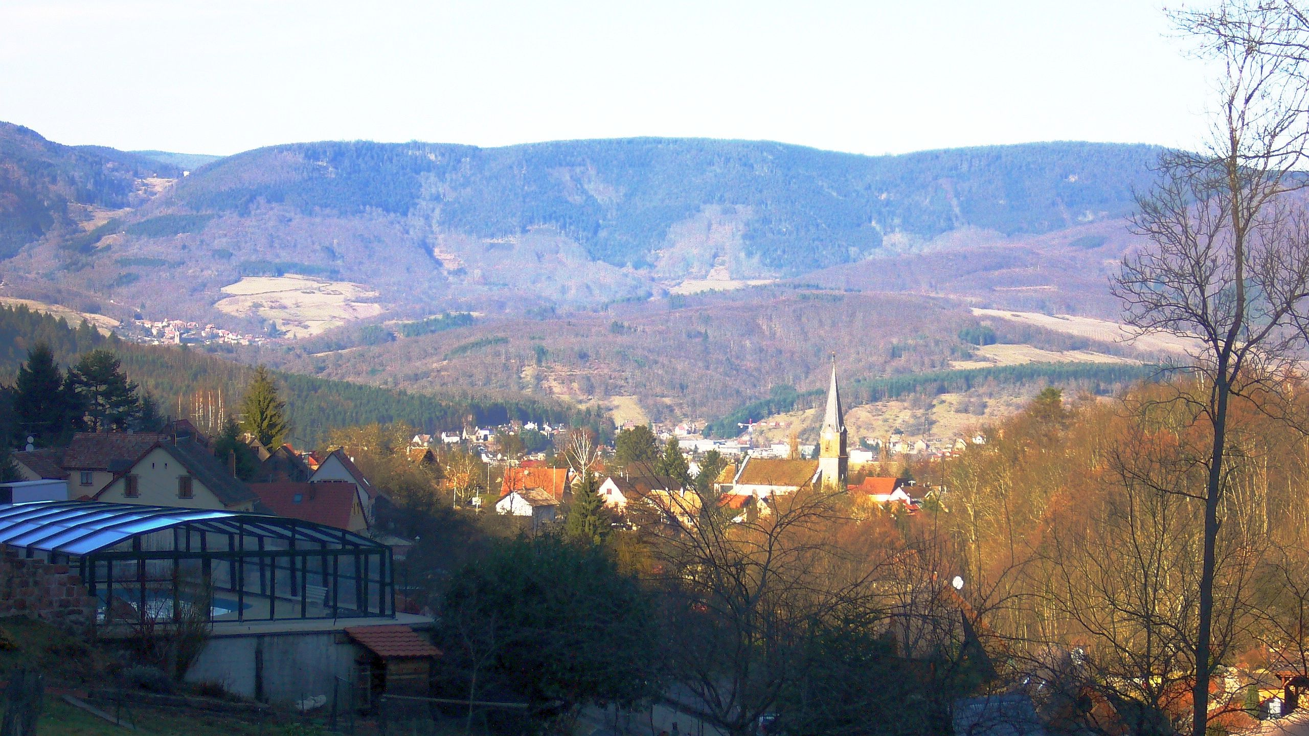 Vue sur Breitenau